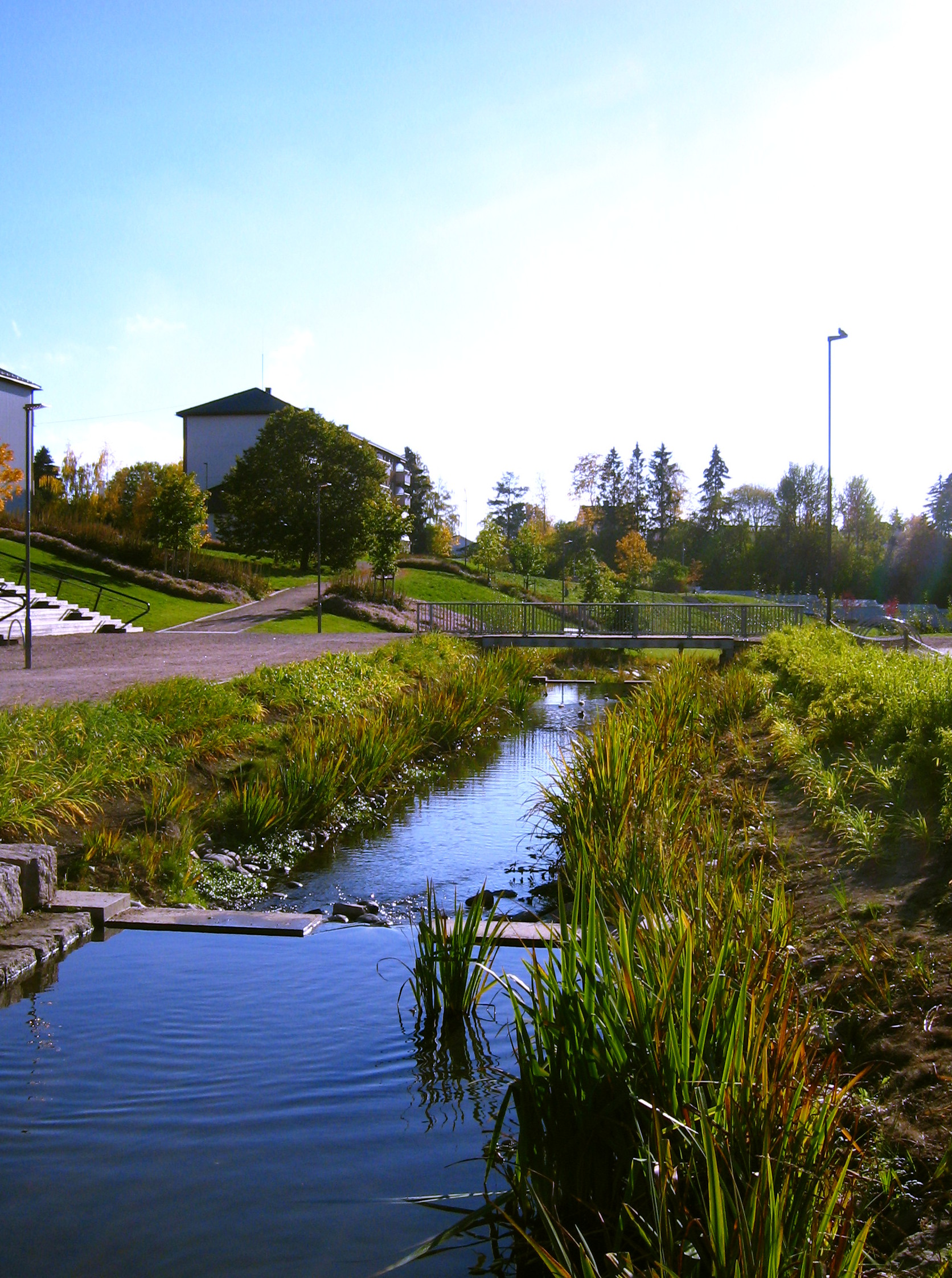 Park Bjerkedalen w Oslo. Renaturyzowany potok Hovinbekken.